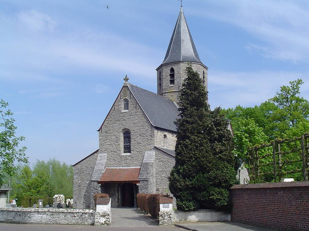 De Sint-Jan-Baptist kerk van Afsnee bij Gent